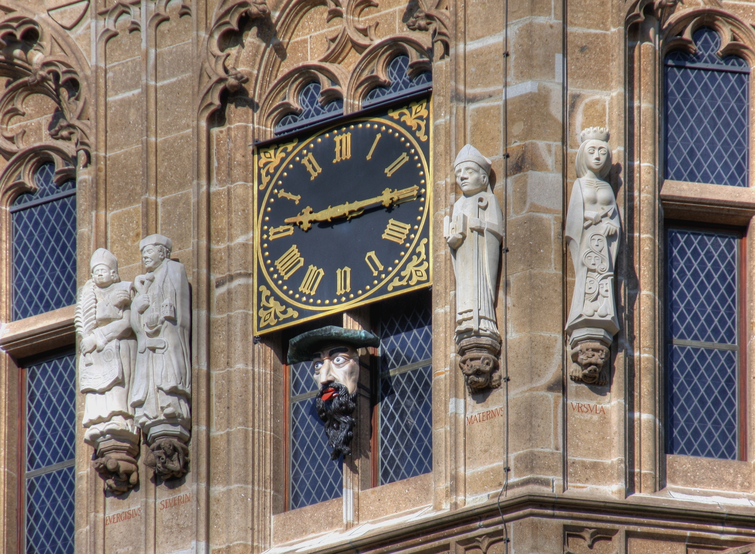 Rathausturm Köln mit den Figuren: Evergislus - Severin - Jabbek - Maternus - Ursula.